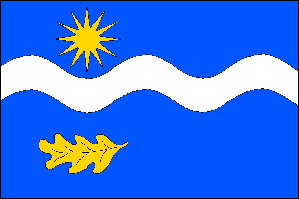 vlajka, Planá nad Lužnicí, okres Tábor